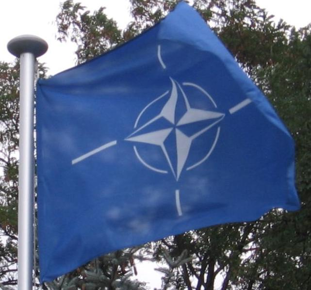 Bandera de la OTAN